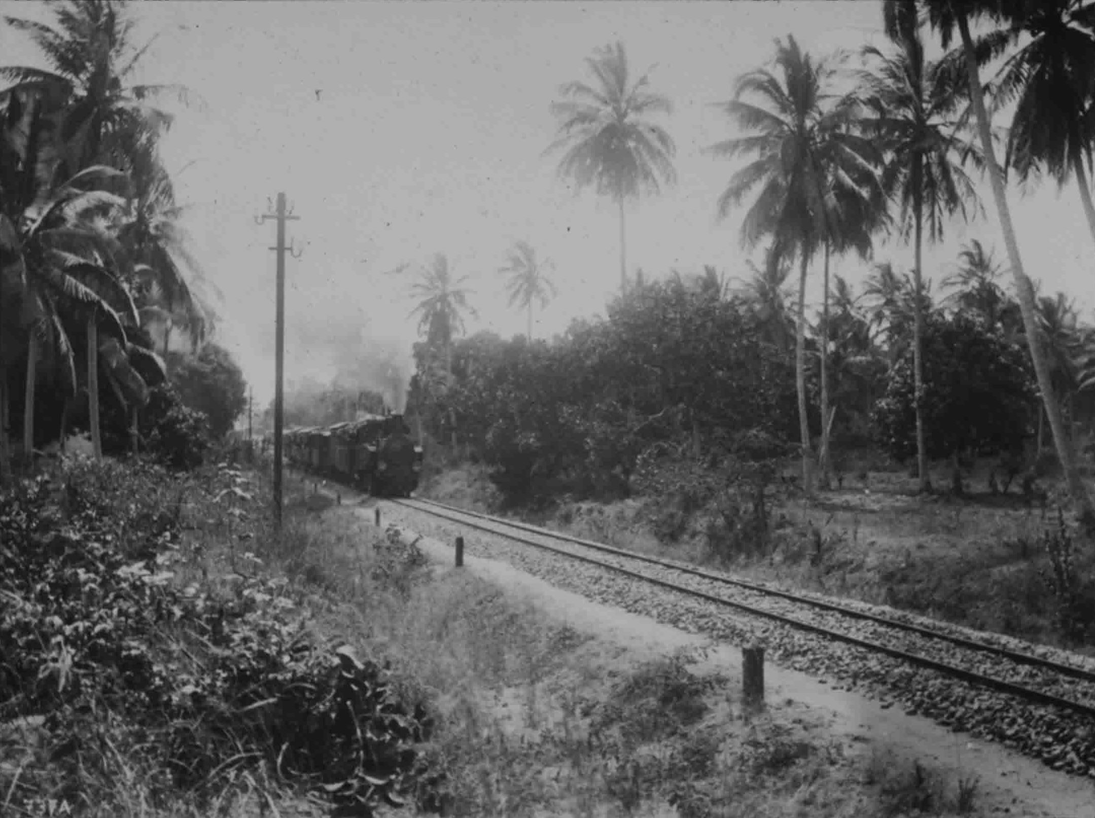 Usambarabahn unter Palmen Standort: 0400/StuUB Bildnummer: 026-0400-76 CD-Code: CD/6264/3051/3181/6264_3051_3181_0077 Text auf dem Bild: Die Usambarabahn / 396 Text auf der Hülle: Format Bildträger: formale Bemerkung: Entstehungsjahr: Entstehungsjahr Vorlage: Photograph: Region: / Afrika, Ostafrika, Tansania Völker: Sachgruppe: / Verkehr, Landverkehr, Schienenverkehr, Eisenbahn, Lokomotive / Verkehr, Landverkehr, Schienenverkehr, Eisenbahnlinie, Usambarabahn / Verkehr, Landverkehr, Schienenverkehr, Schienen / Landschaft, Vegetationseinheit, Wald